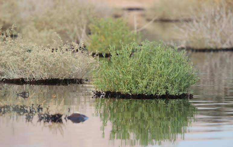 שרידי דליפת הדלק בשמורת הטבע בעברונה בנגב